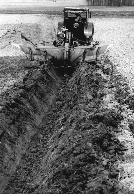 Sachsenburg, Einsatz eines Grabenpflugs Zentralbild Gahlbeck 13.4.1963 Spezialistentrümpfe im Kreis Hainichen: Technik voll nutzen. In vier Einsatztagen wurden im Kreis Hainichen auf mehr als 1000 Hektar Sommergetreide, fast die Hälfte der entsprechenden Anbauflächen, die Saat in den Boden gebracht. Die Spezialisten der beiden MTS und der LPG des Kreises spielen dabei ihre Trümpfe, die volle Ausnutzung der modernen Technik, gut aus. UBz: Zu den Spezialisten, die weiterhin in der MTS stationiert bleiben, damit Großraumgeräte rationell zum Einsatz kommen, zählt Klaus Janichen mit seinem Grabenräumpflug. Täglich räumt er mit disem modernen Gerät bis zu 1500 Gräben. Sein Jahresplan sieht insgesamt 28000 Meter Grabenräumen vor. Auf dem Bild: Beim Einsatz auf einem Feld der LPG "Fritz Heckert" Sachsenburg im Kreis Hainichen. (Am Gerät noch LPG-Vorsitzender Günter Ruprecht).